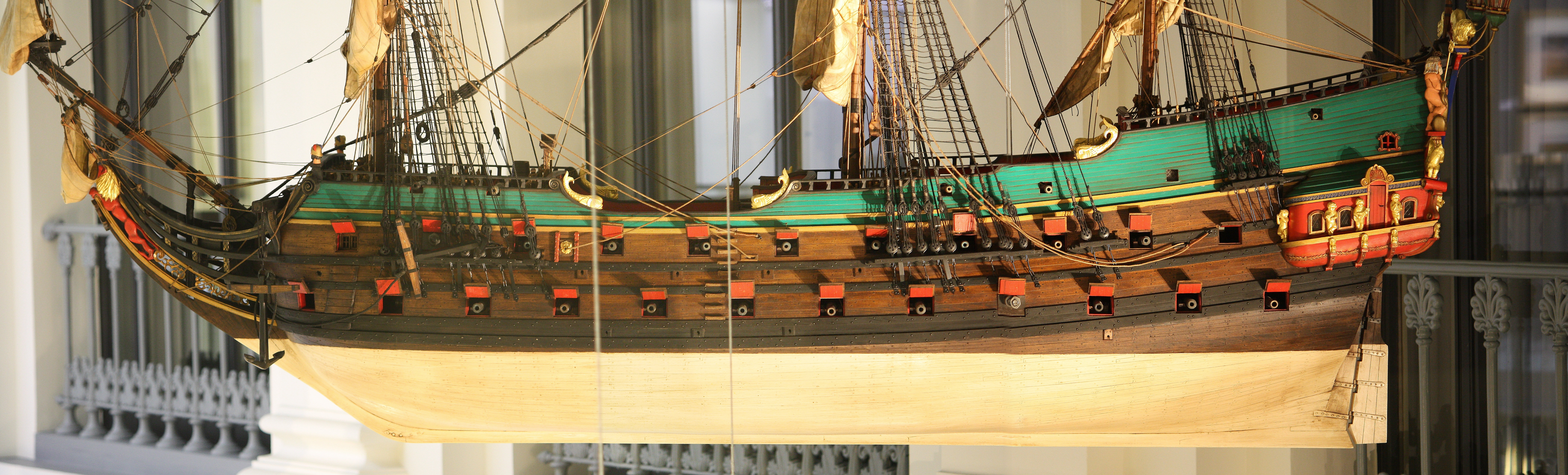 Modell des hamburgischen Konvoyschiffes Wapen von Hamburg (I) - Panoramaansicht